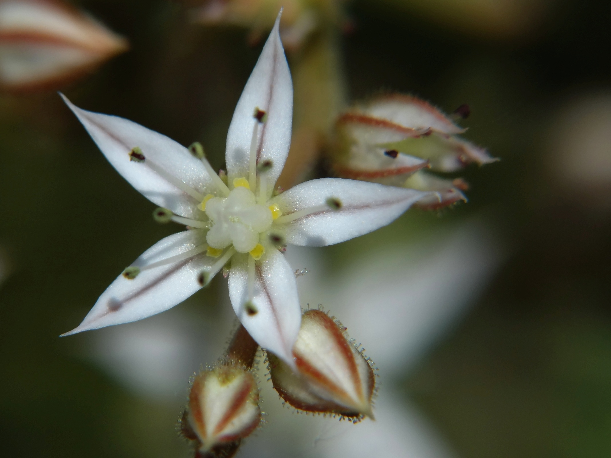 Sedum album flos